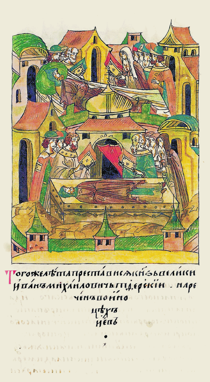 В том же году скончался князь великий Иван Михайлович Тверской, наречен был в иноках Иов.